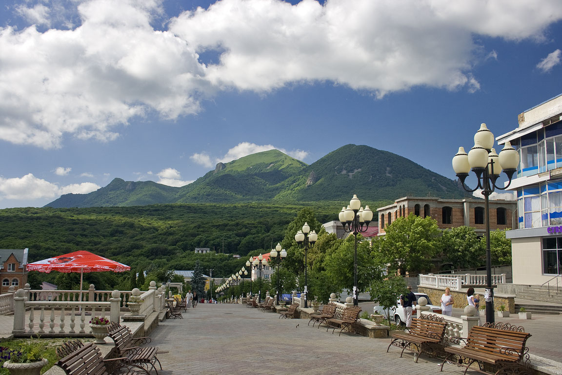 Гора Бештау. Вид с Лечебного парка